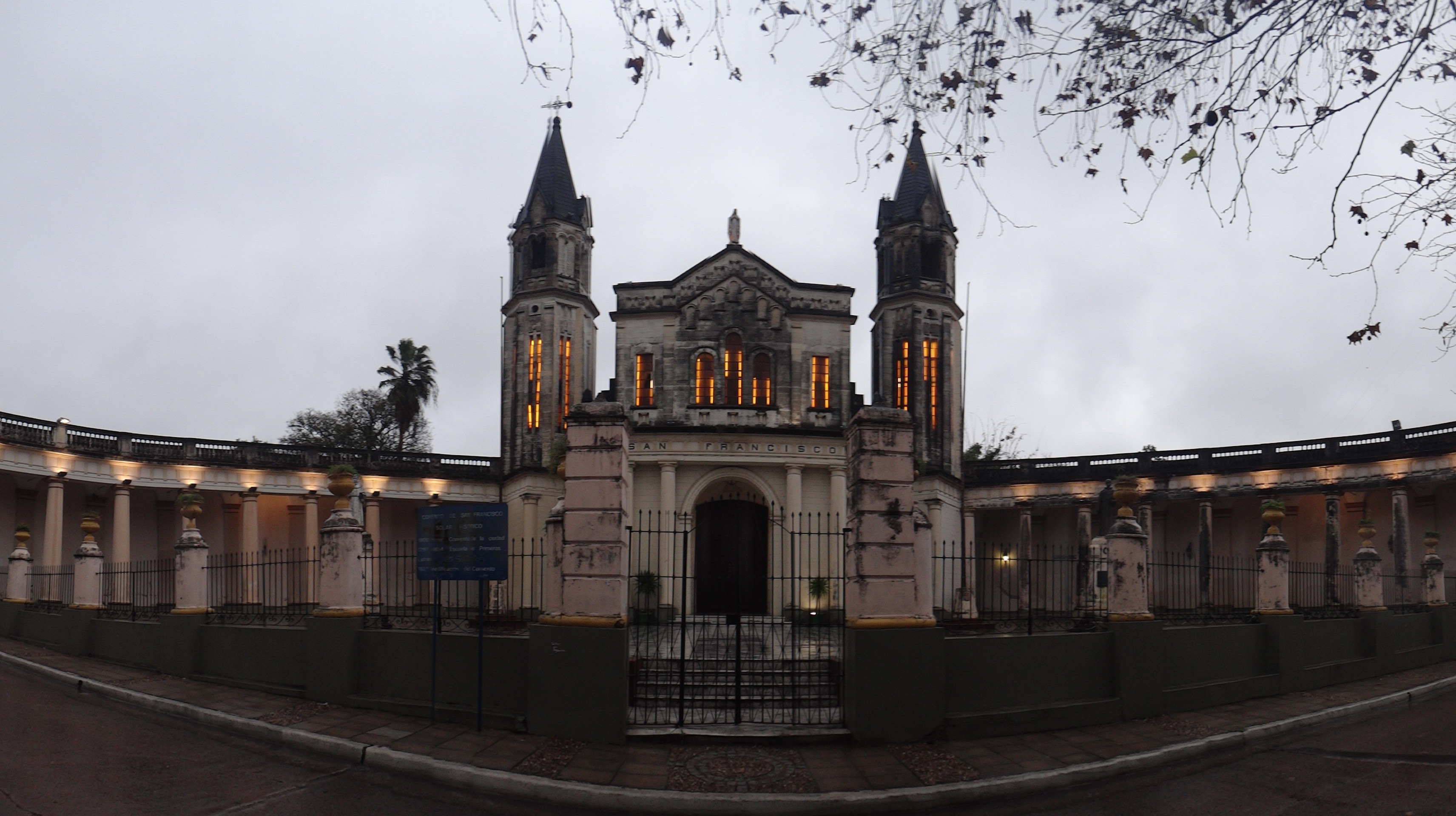 Convento de San Francisco, en la ciudad argentina de Corrientes.